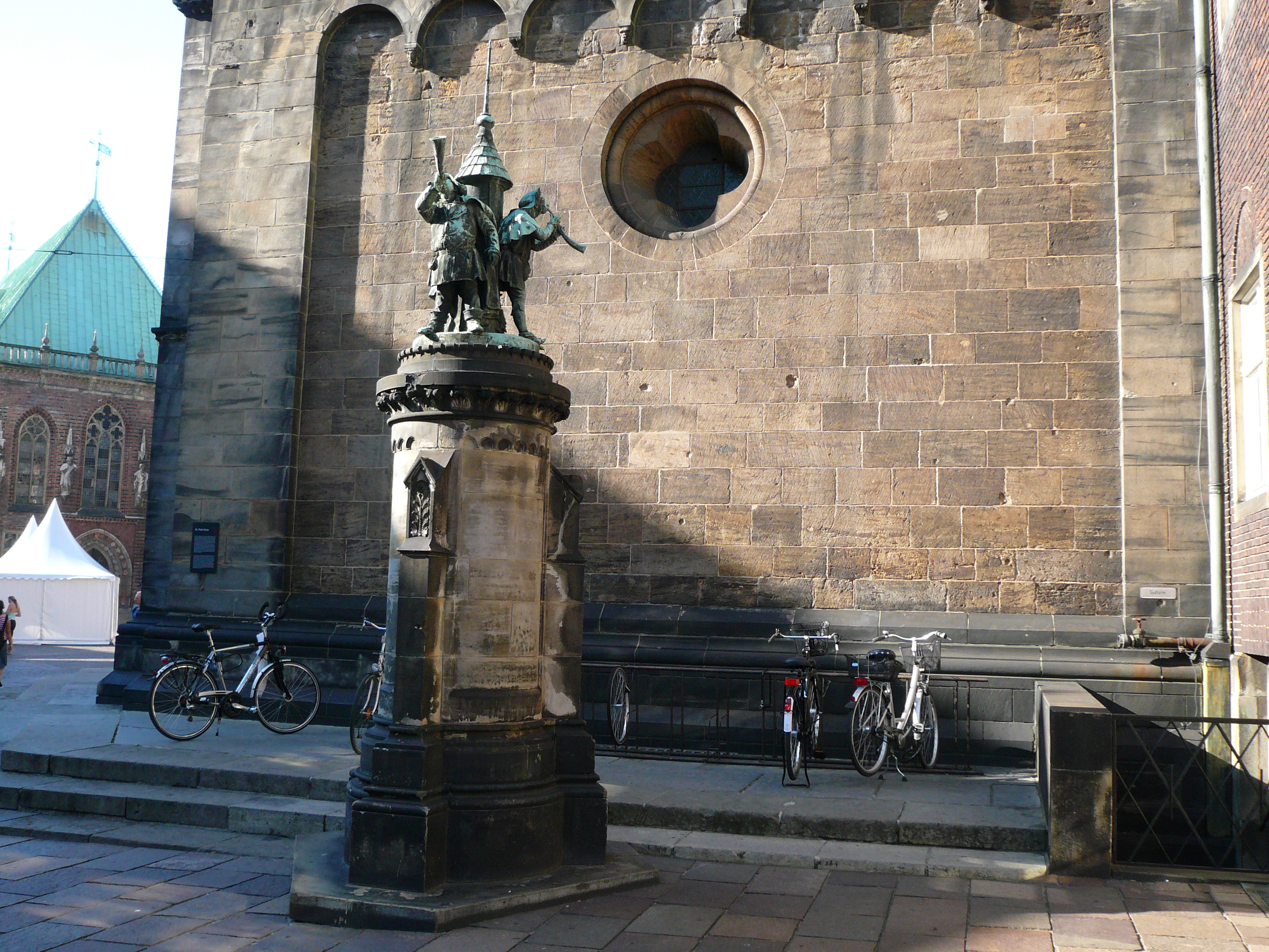 Das Denkmal „Dombläser“ in Bremen